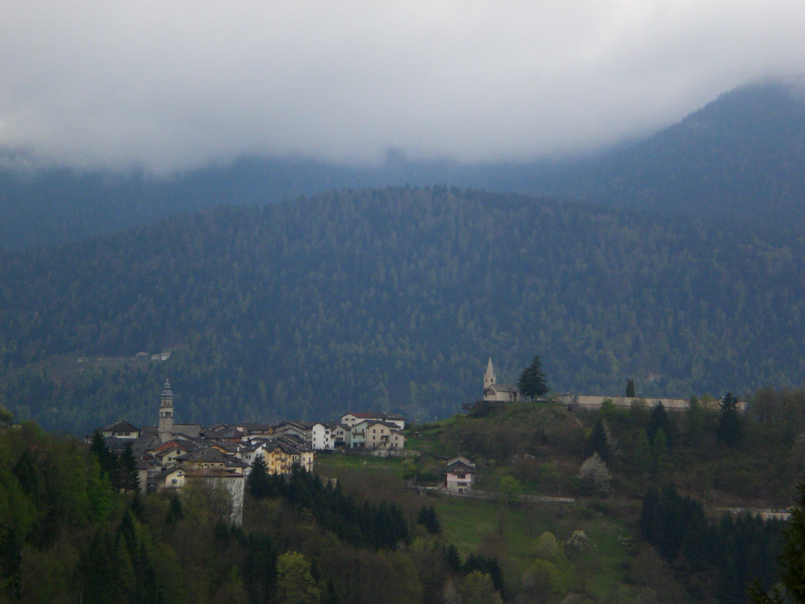 Castello Tesino visto dalle pendici del Monte Agaro Licensing